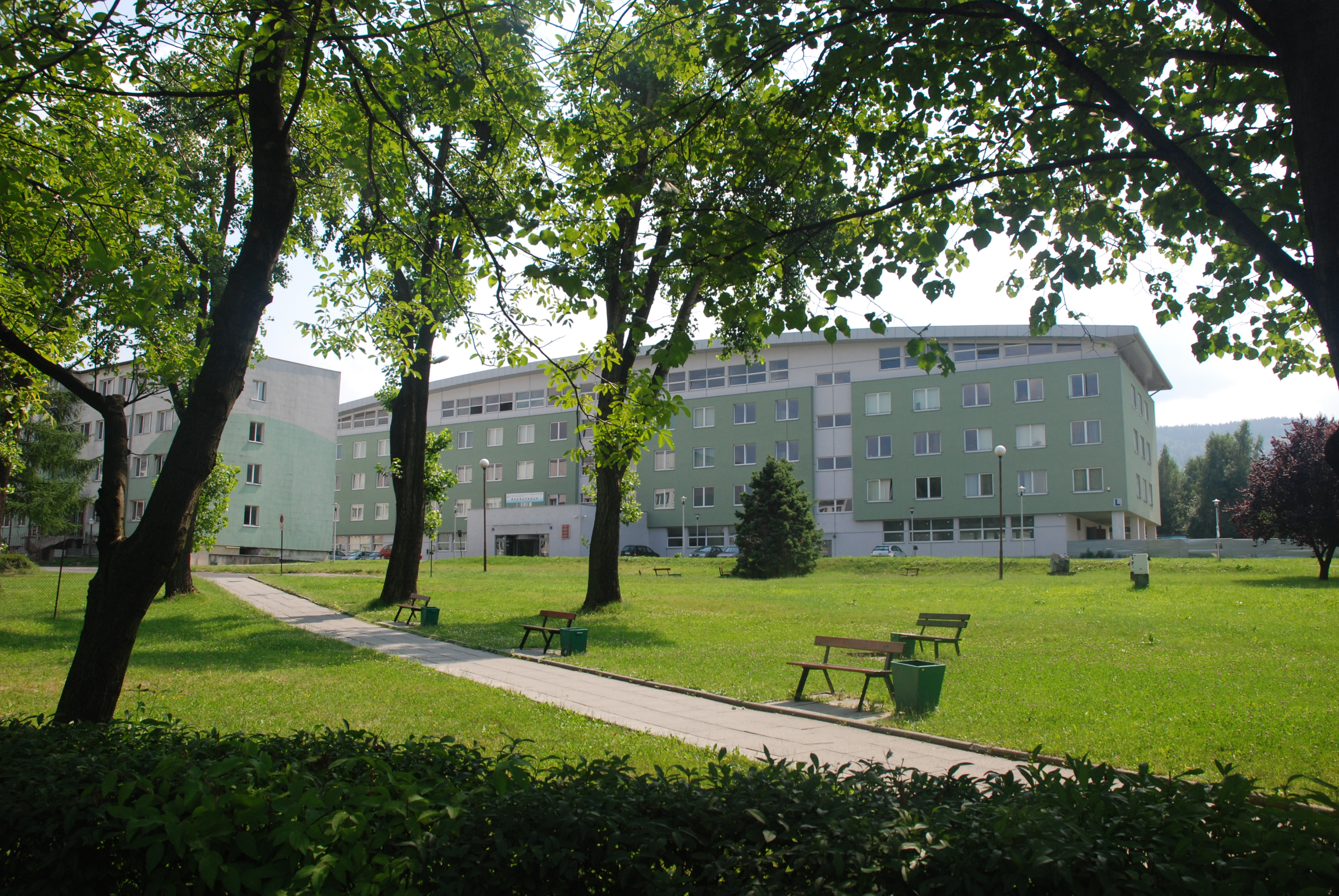 University of Bielsko-Biala